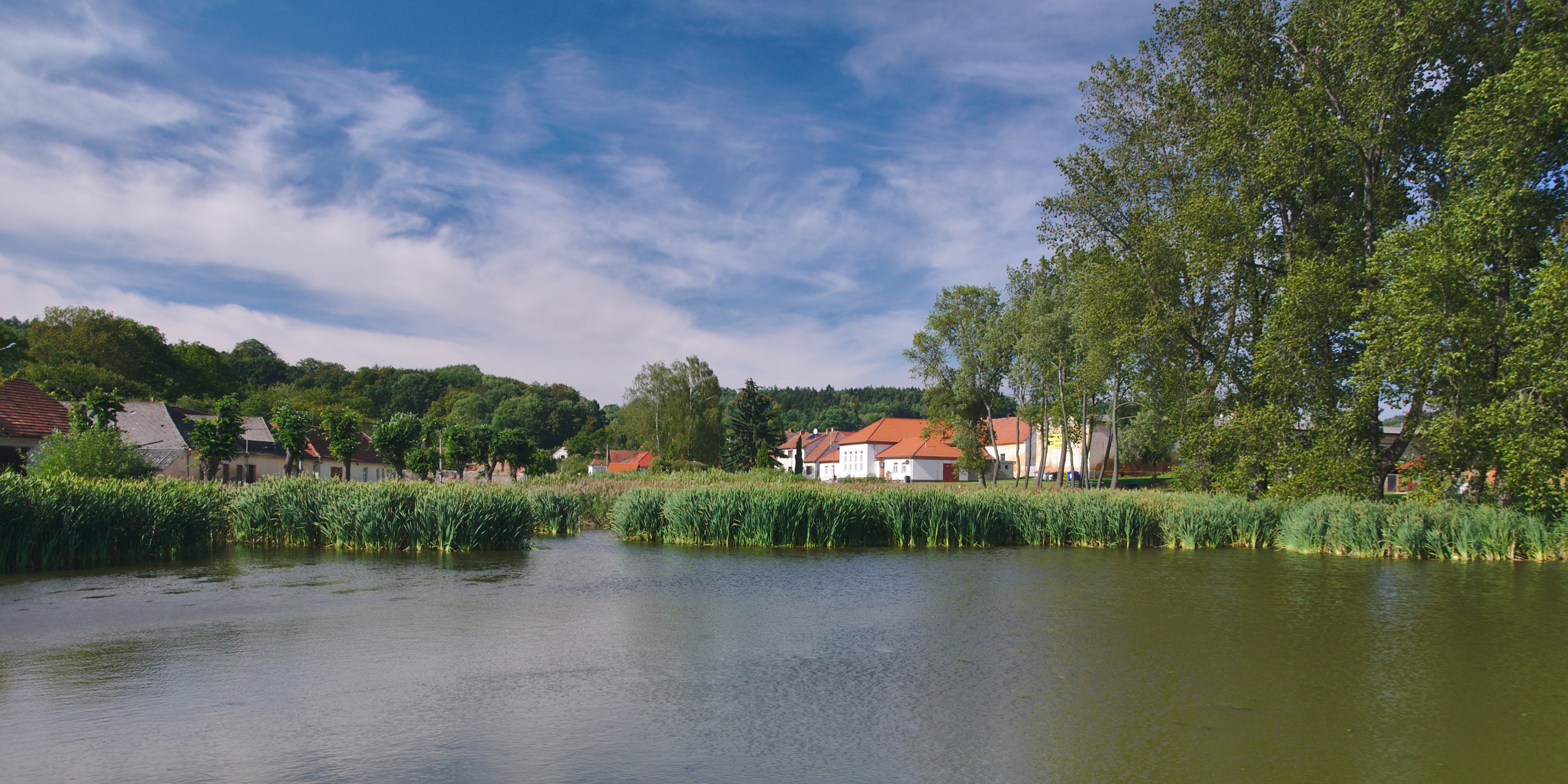 Pohled na obec přes rybník, Míchov, okres Blansko